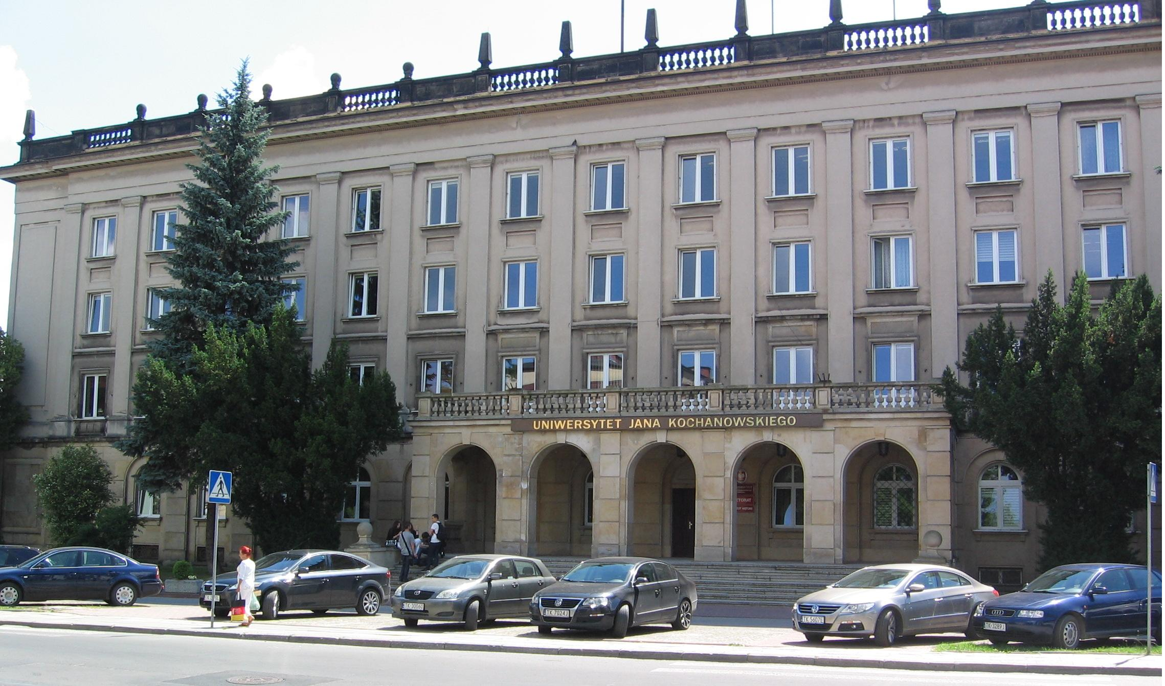 Rektorat i Instytut Historii UJK w Kielcach przy ul. Żeromskiego 5.